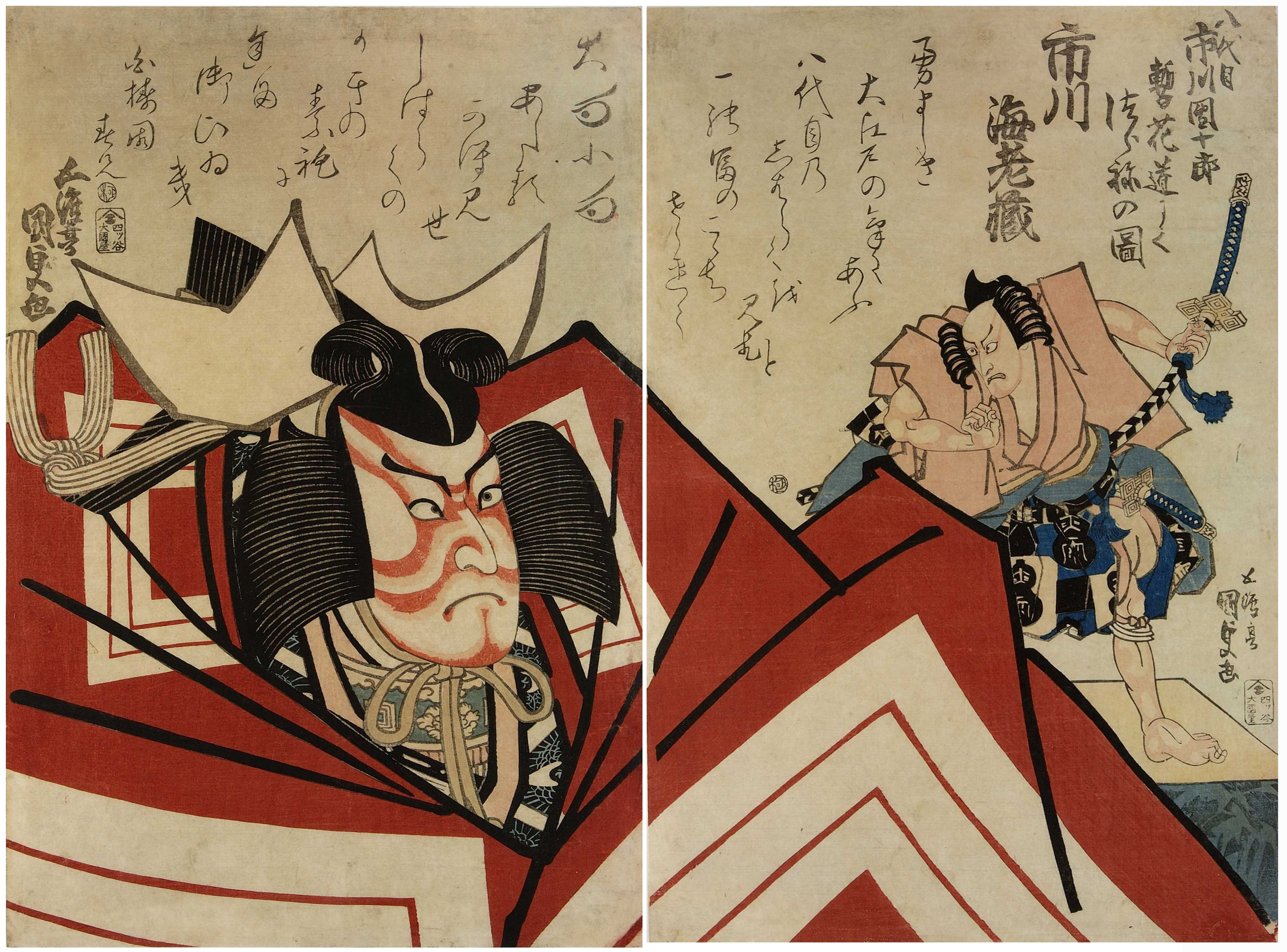 Ichikawa Danjuro Ⅷ, Shibaraku （八代目市川団十郎暫花道にてつらねの図）